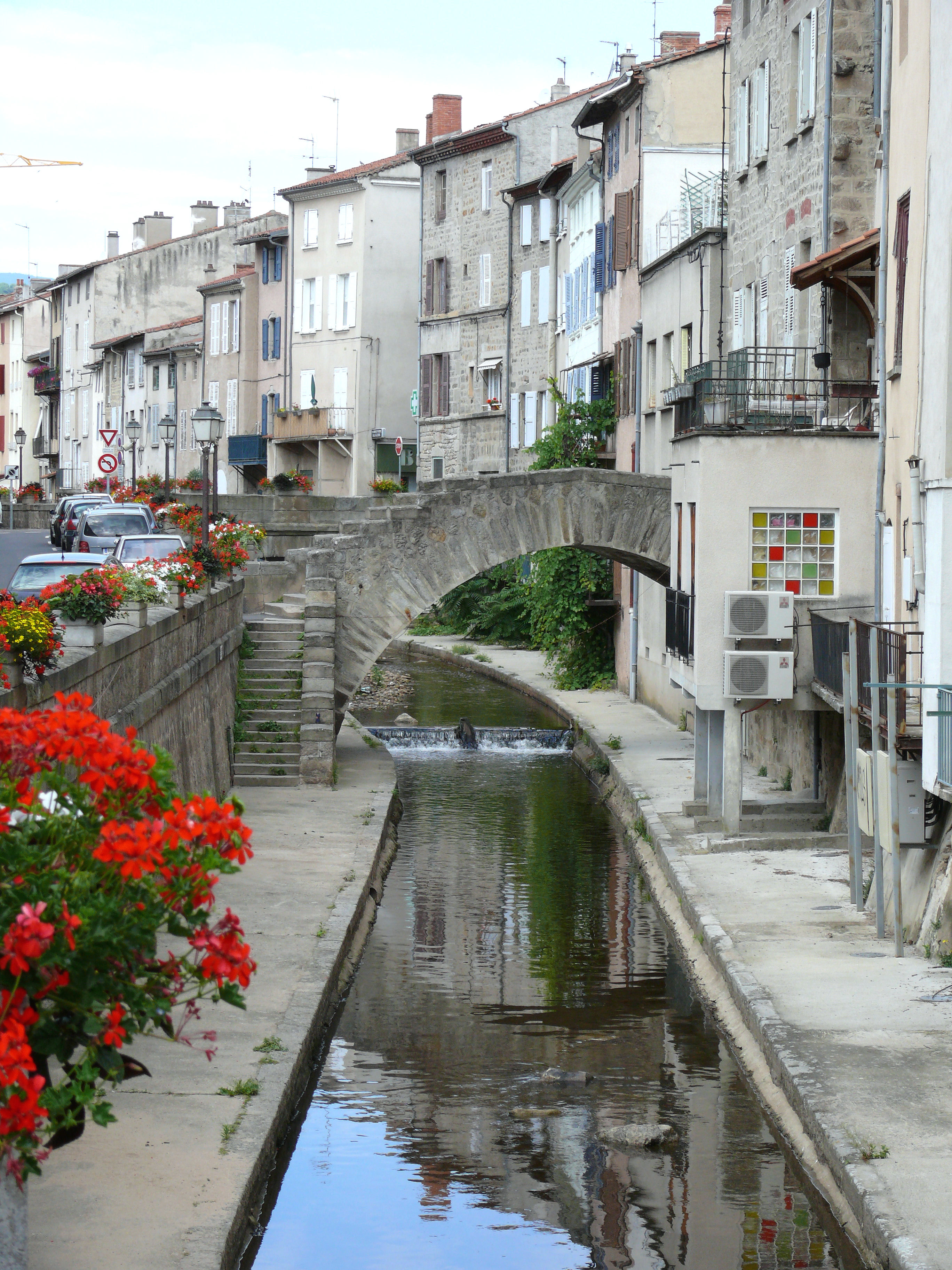 Monbrison - La Vizézy